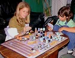 Photo de mes filles jouant à Manhattan d'Andreas Seyfarth.